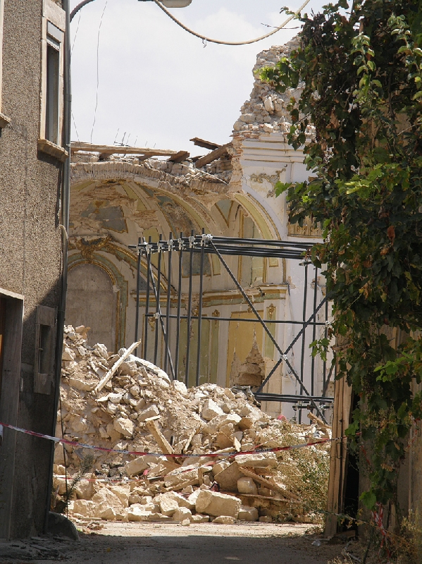 Foto tra Navelli e L'Aquila